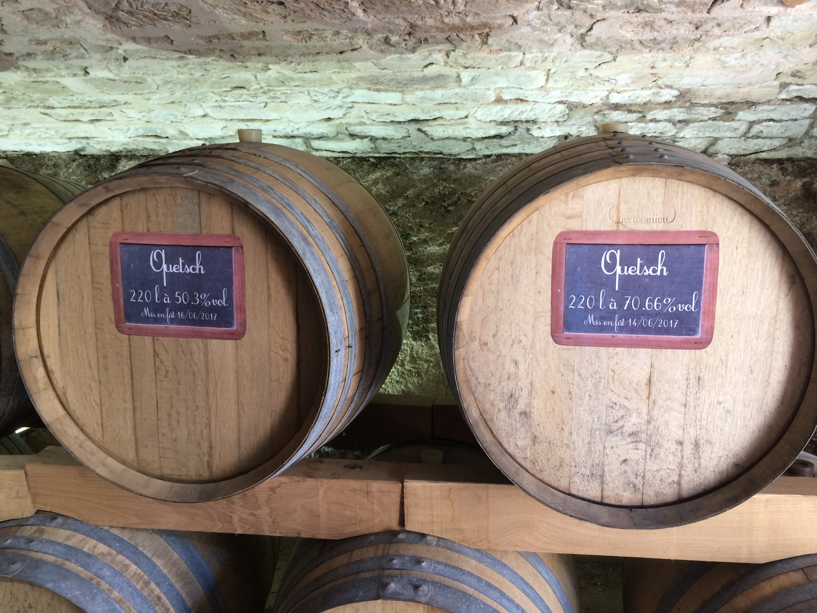 Fûts d'eau-de-vie de quetsch à la distillerie Paul Devoille à Fougerolles (Haute-Saône, France)